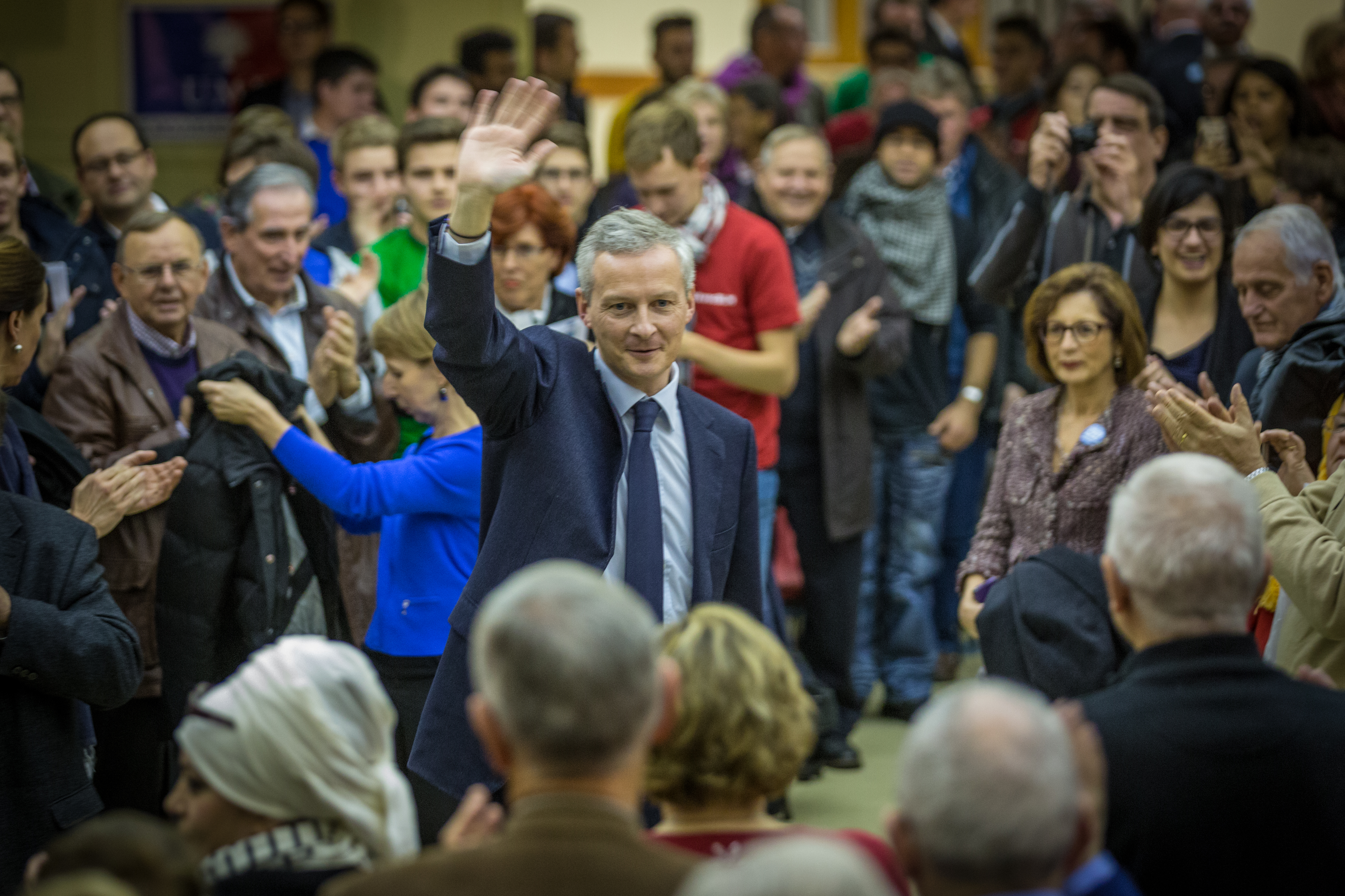 Bruno Le Maire, réunion publique à Strasbourg le 21 novembre 2014.